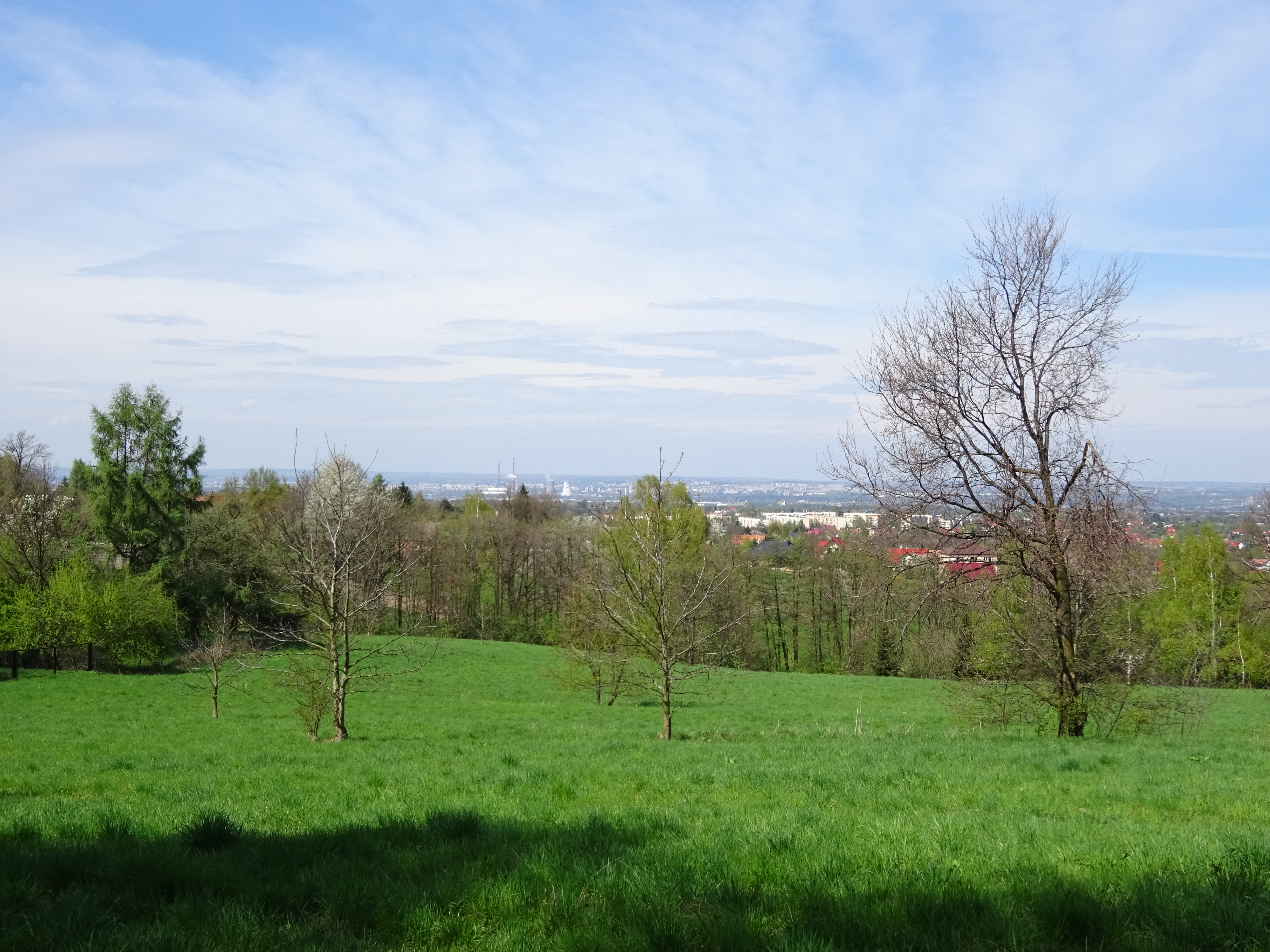 Widok z Pogórza Wielickiego (ze wsi Lednicy Górnej) na Wieliczkę i Kraków (w oddali). 2016